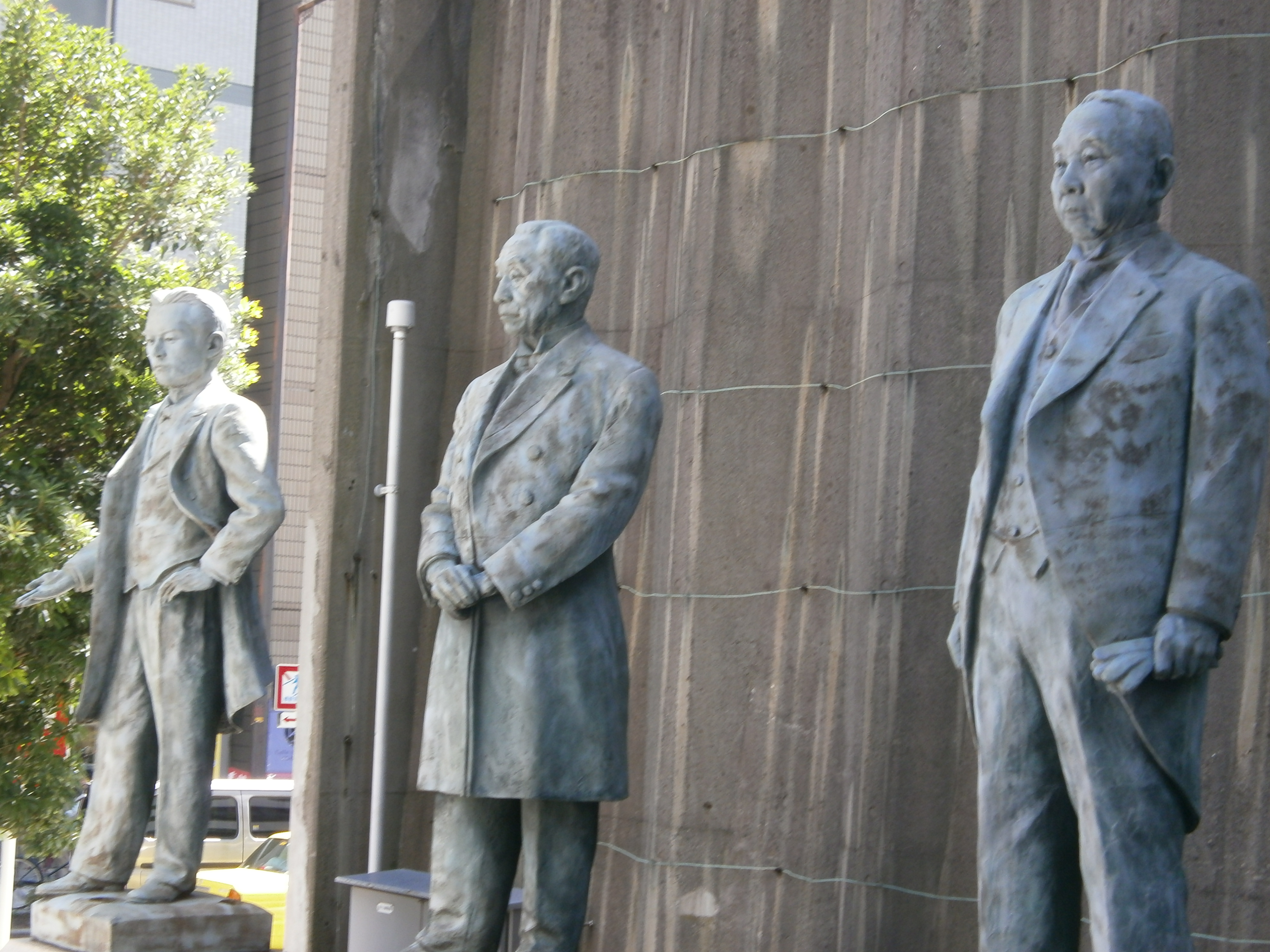 大阪商工会議所初代会頭の五代友厚、７代会頭・土居通夫、１０代会頭・稲畑勝太郎